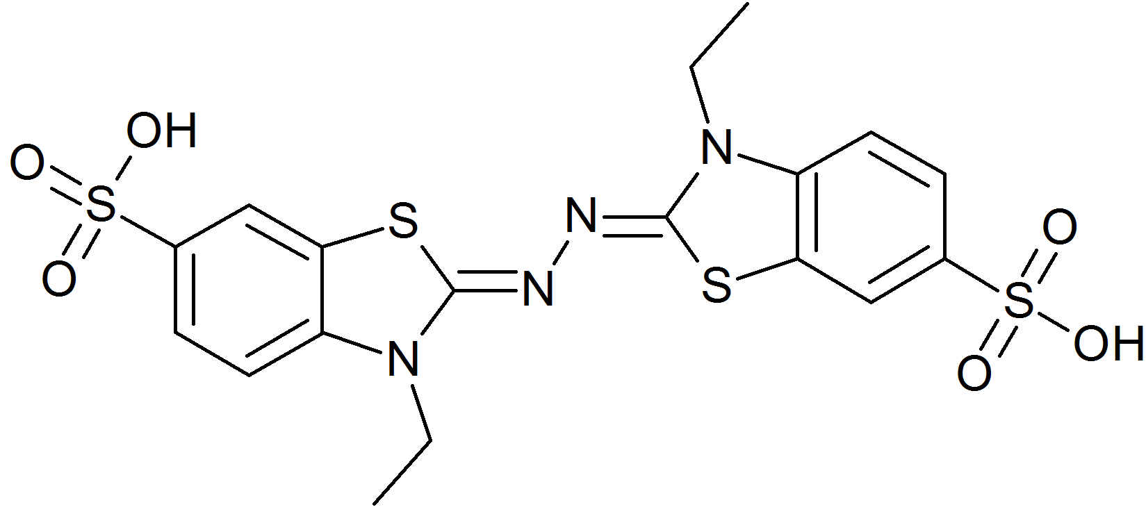 ABTS; ABTS